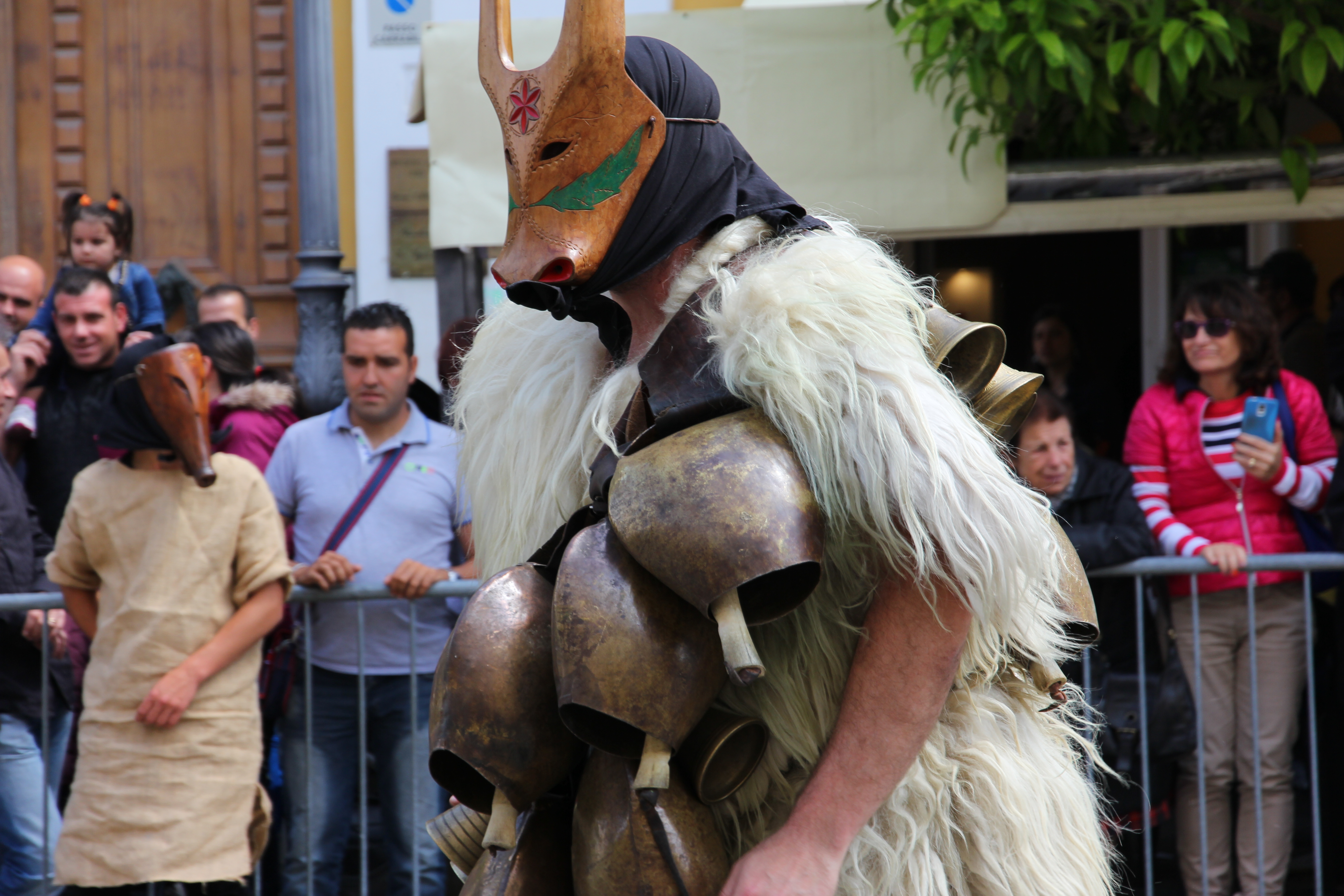 Costume tradizionale